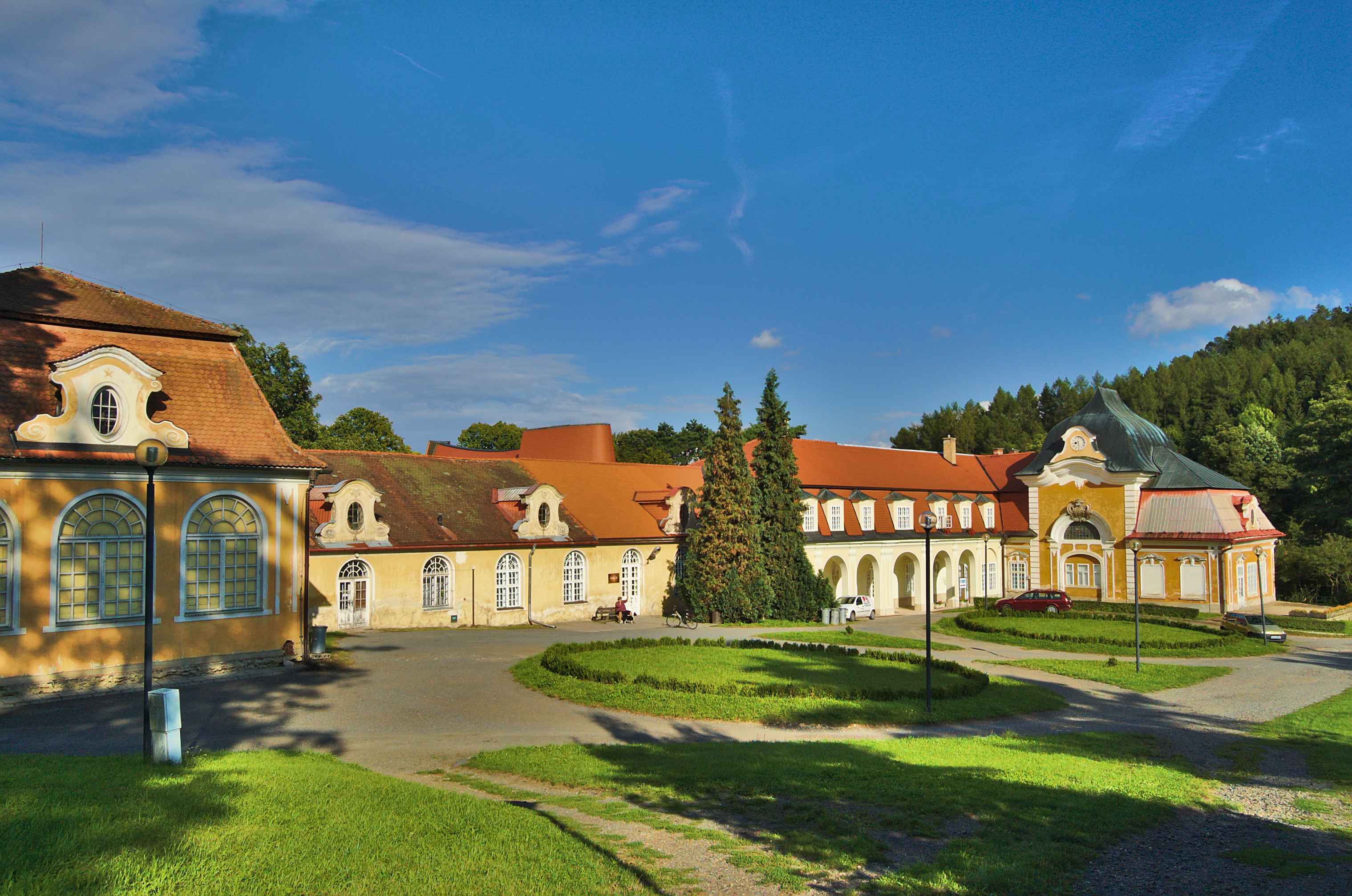 Zámek Velké Opatovice, okres Blansko